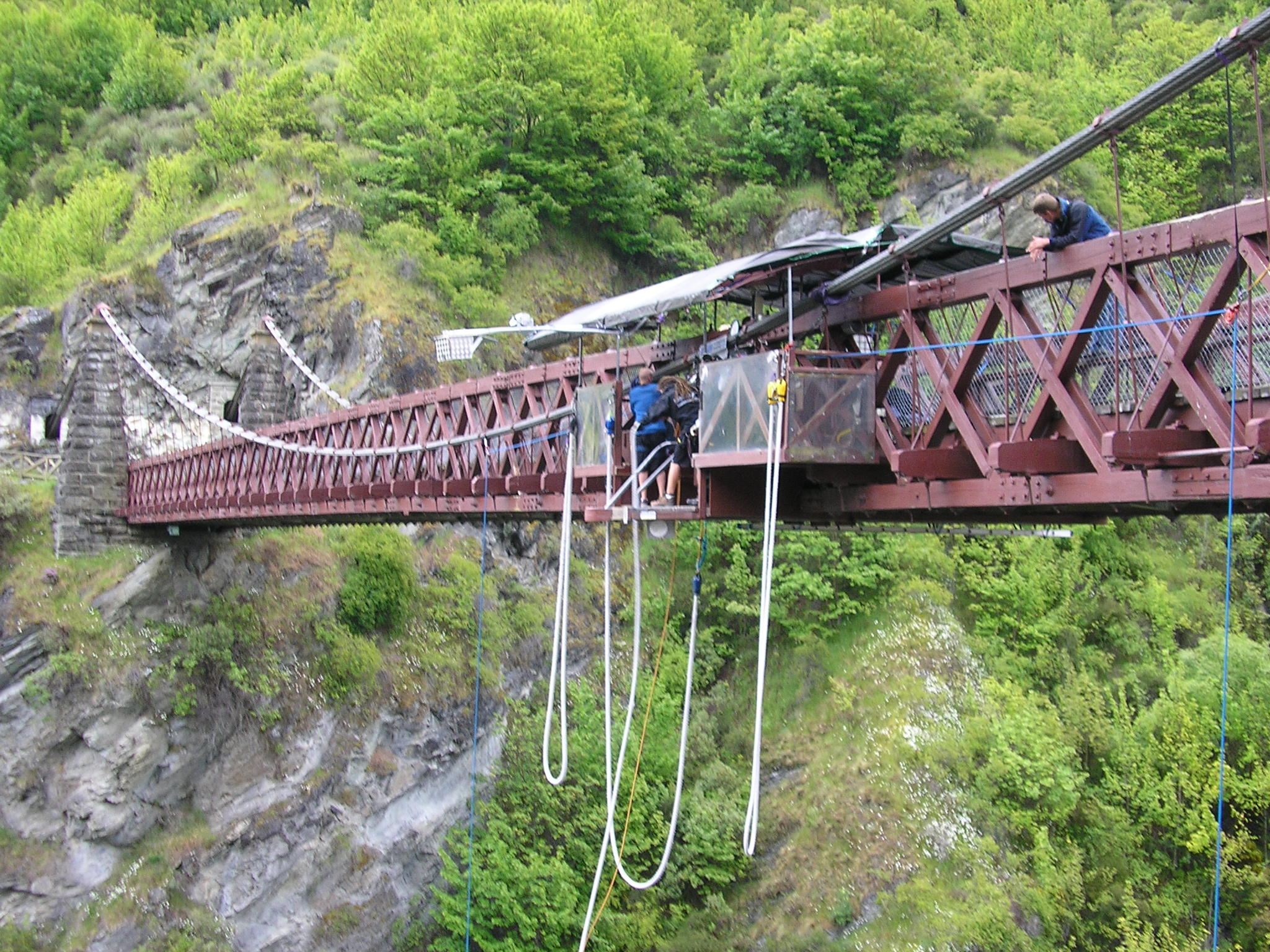 Billede af Kawarau Bridge. Broen er det første sted i verden, hvor der blev drevet komercielt elastikspring.